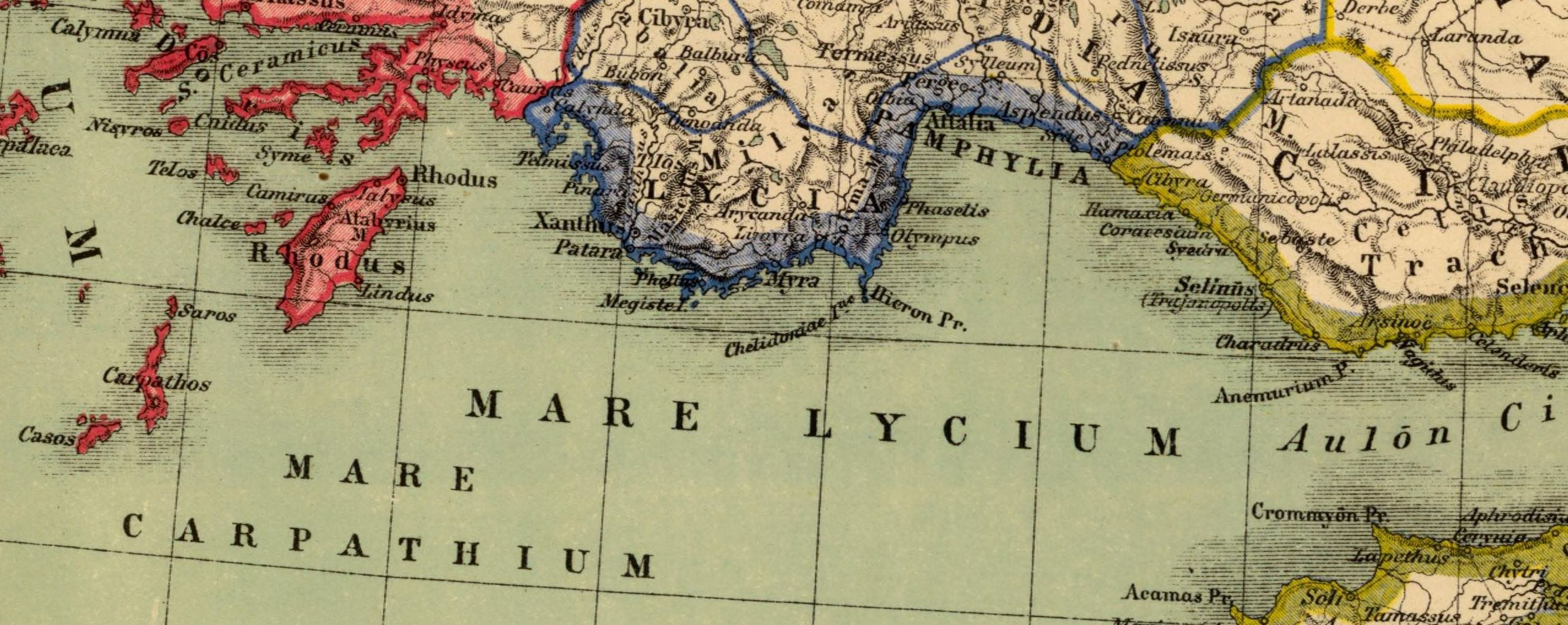 Mare.Lycium. Mare Carpathium. Asia citerior. Auctore Henrico Kiepert Berolinensi. Geographische Verlagshandlung Dietrich Reimer (Ernst Vohsen) Berlin, Wilhemlstr. 29. (1903)